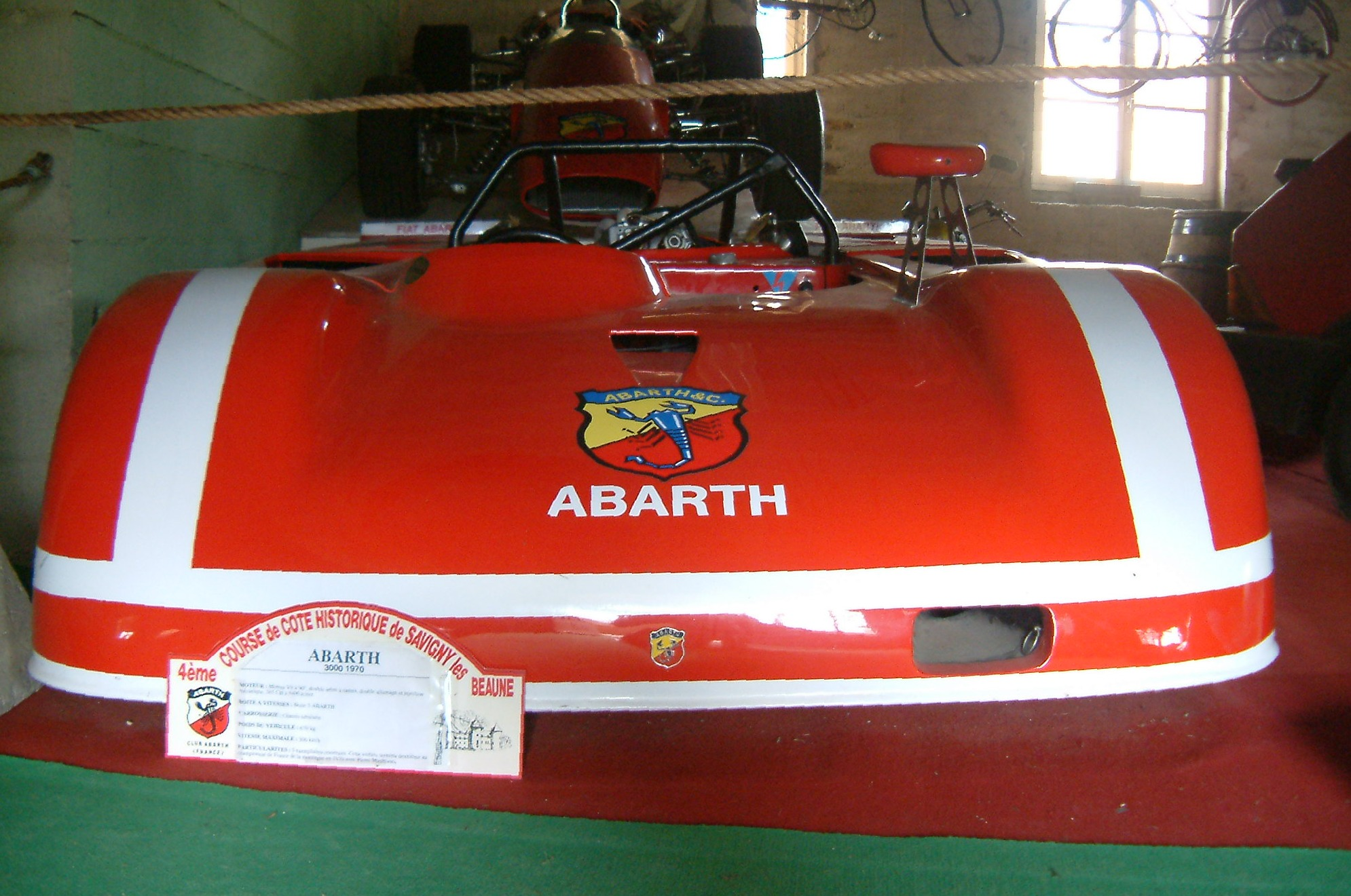 Château de Savigny-lès-Beaune, Bourgogne, FRANCE